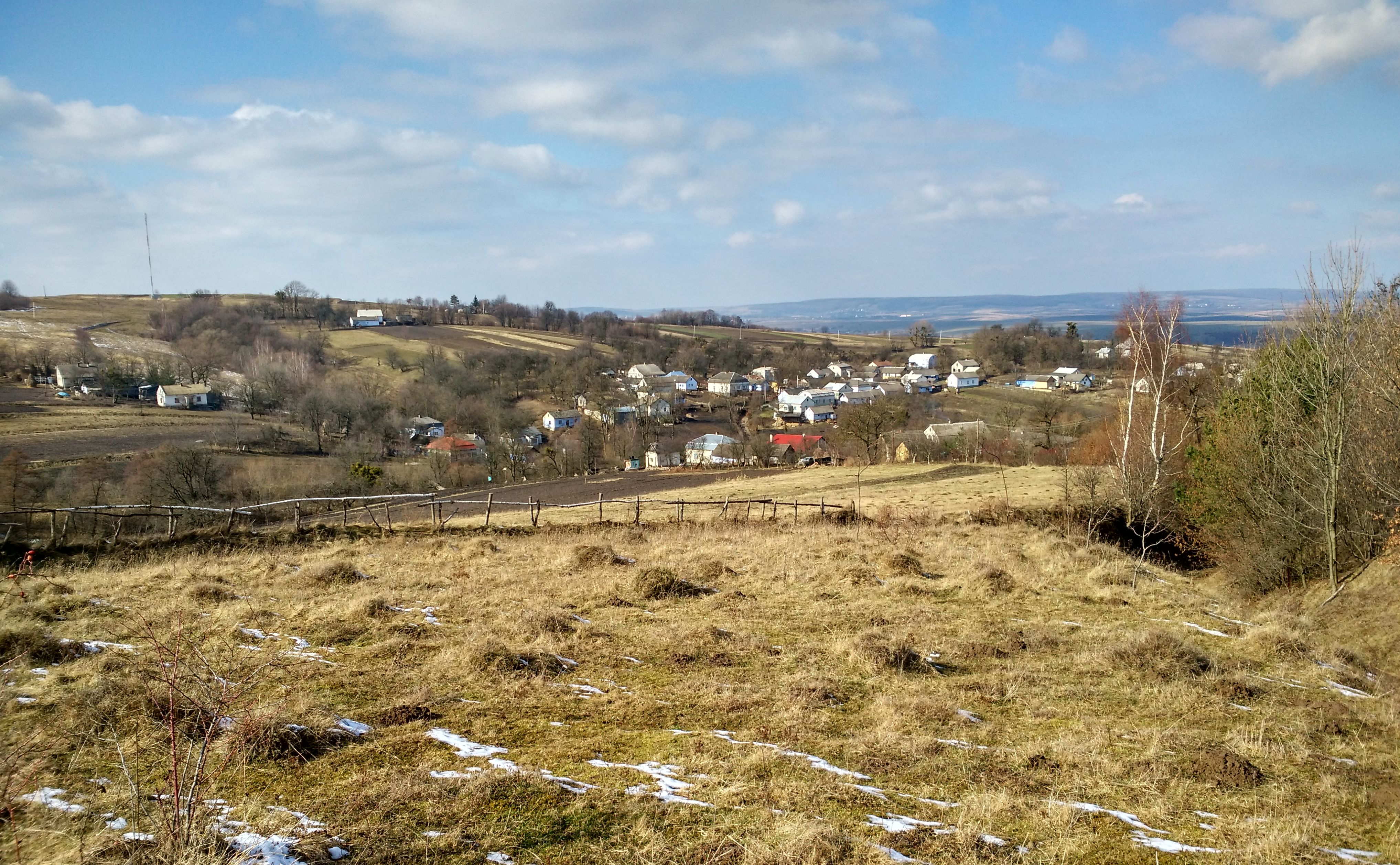 Село Дусанів Перемишлянського району